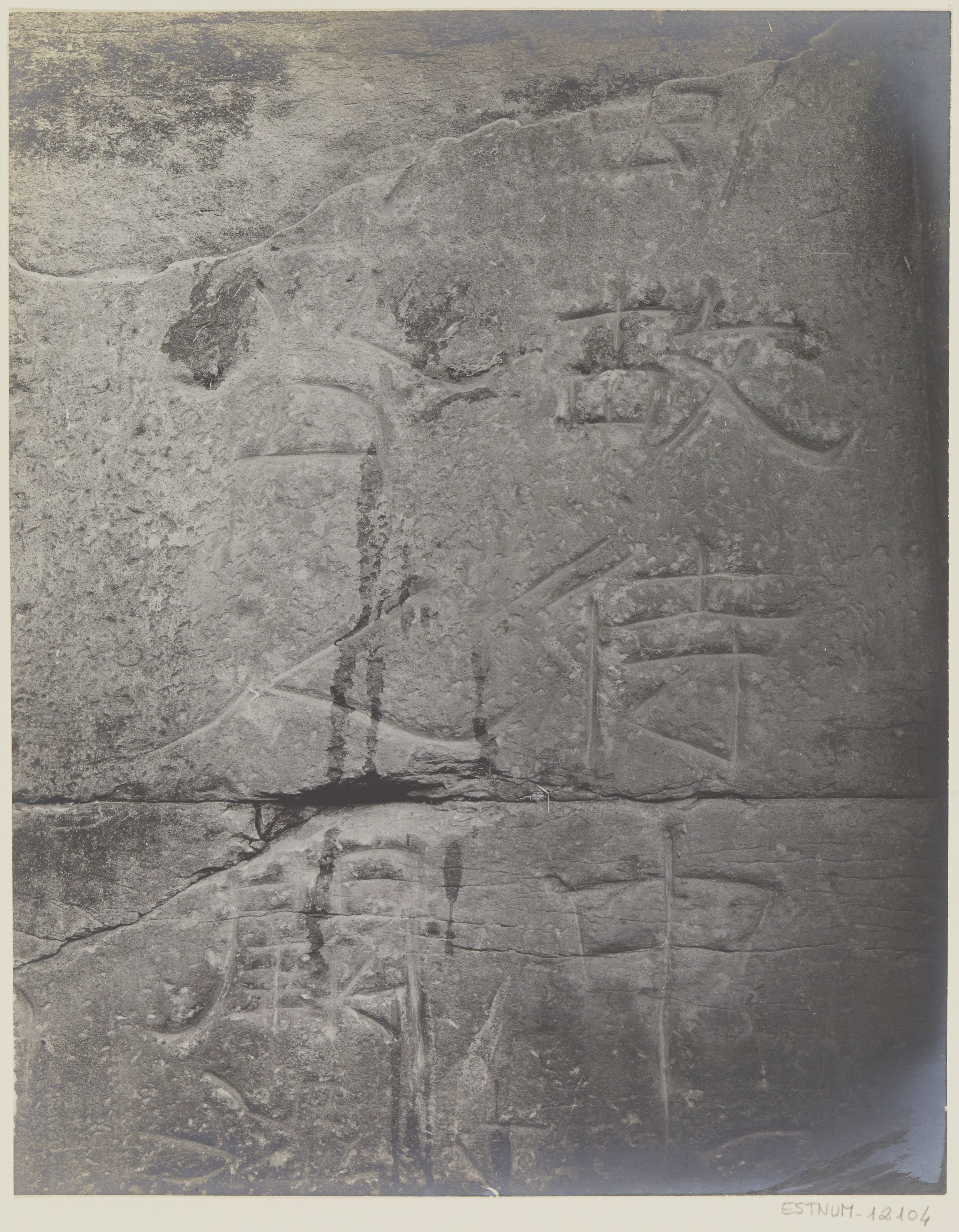 中文（台灣）: 梓潼漢代四闕